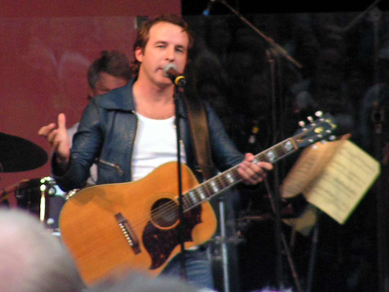 Patrik Isaksson på Fallens dagar i Trollhättan